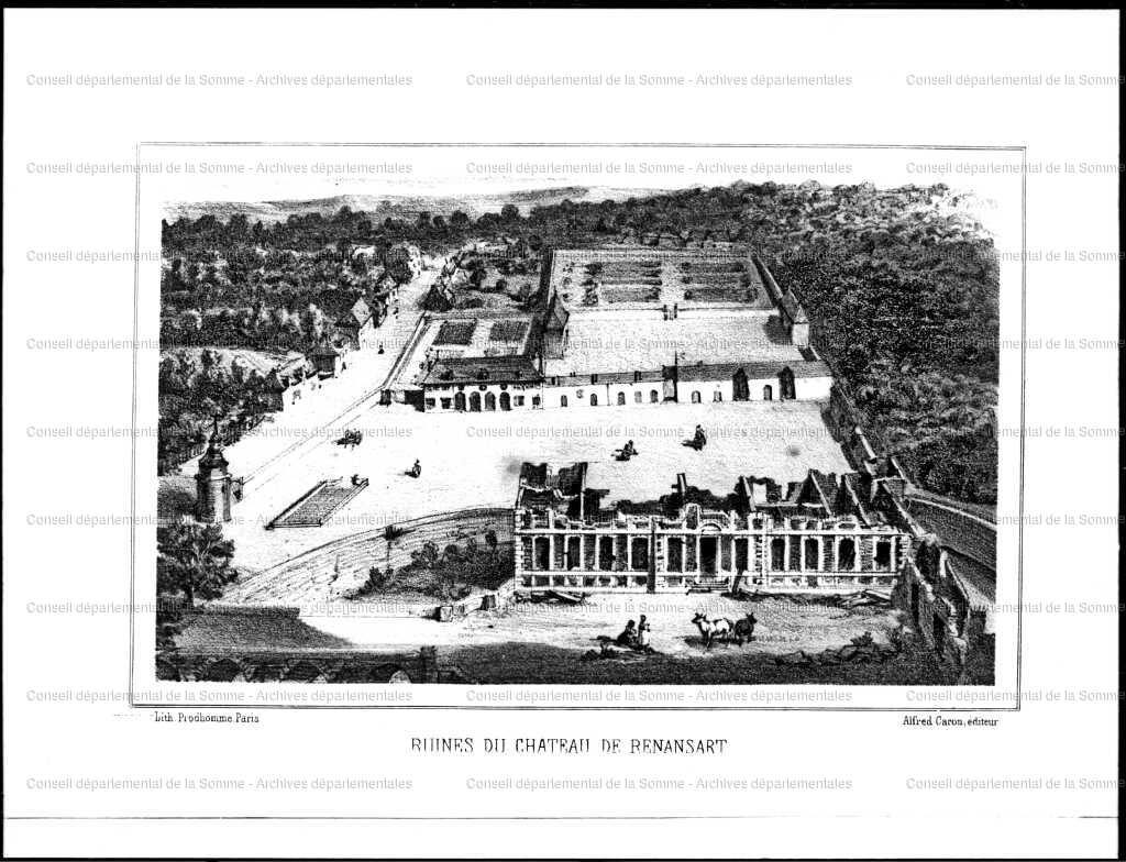 Château de Renansart au XVIIIe archives de la Somme en ligne, microfilms de documentation